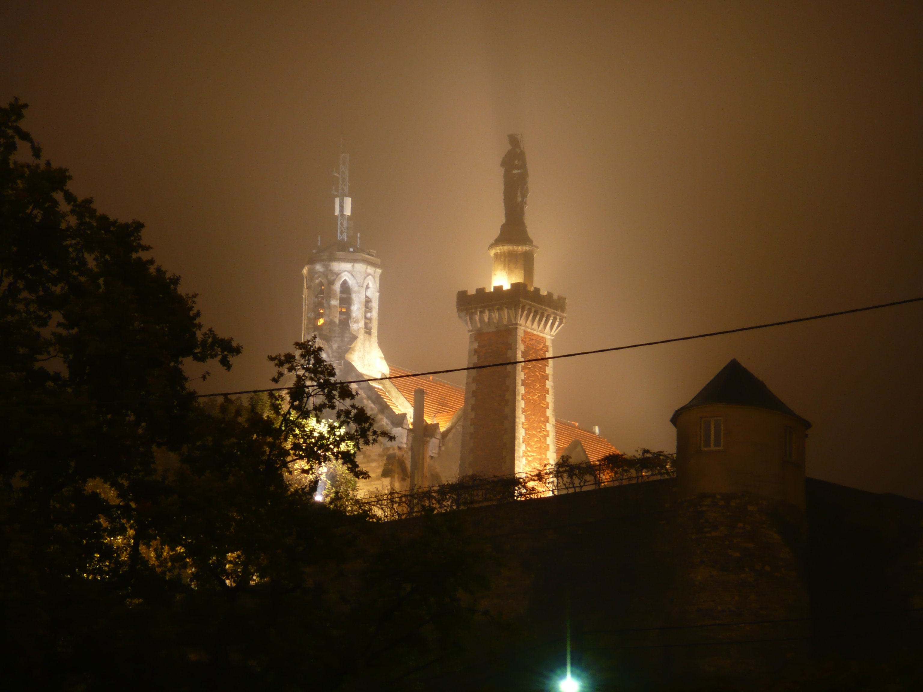 Vienne (Isère, France) : Chapelle Notre-Dame de Pipet de nuit.